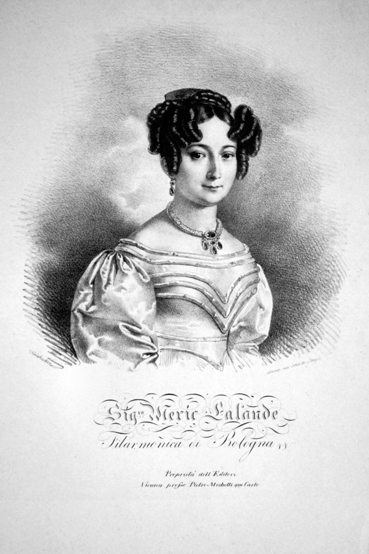 Henriette Meric-Lalande (1798-1867), französische Opernsängerin. Lithographie von Josef Kriehuber, um 1827